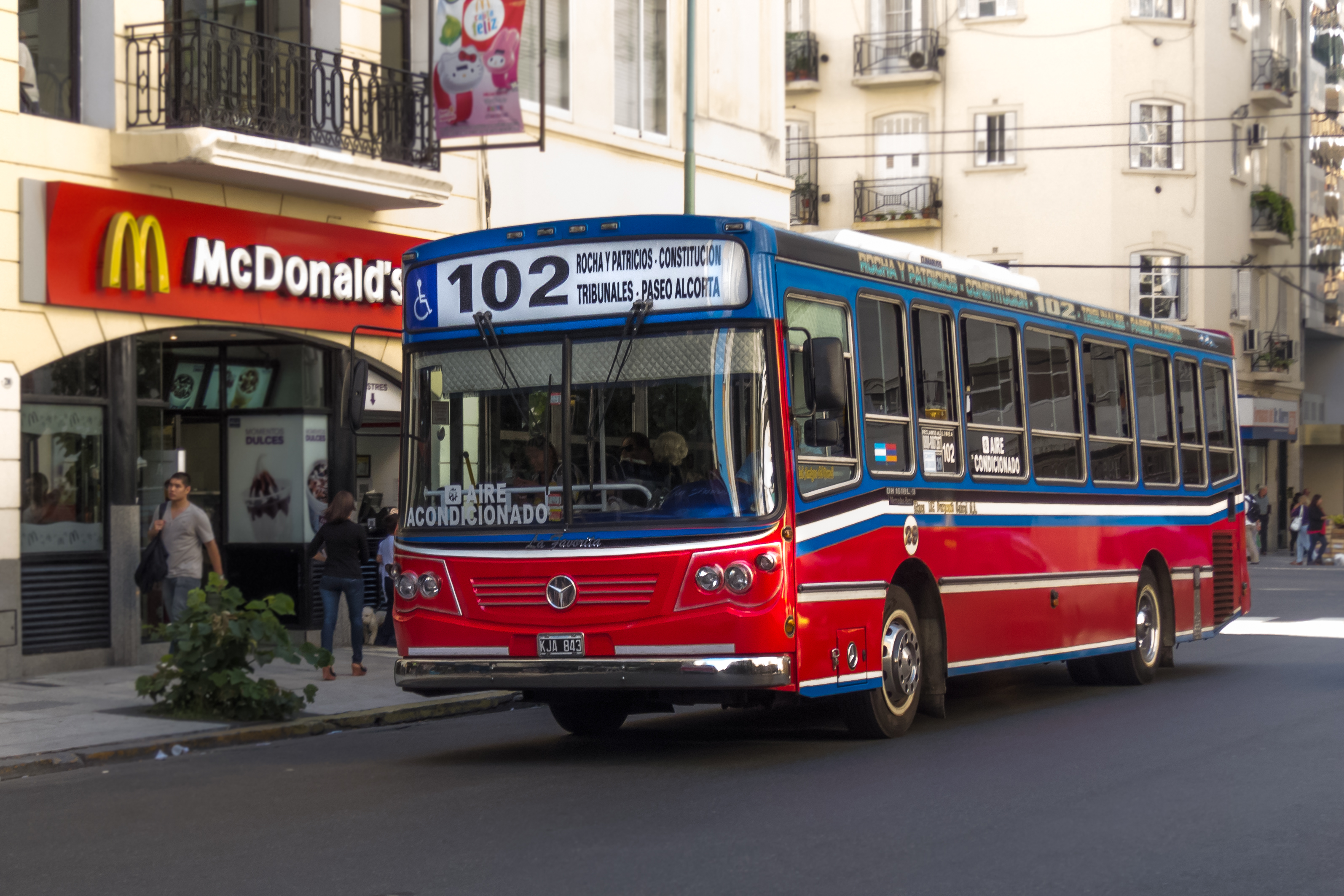 Colectivo de la Línea 102, interno 29, carrocería la Favorita Favorito GR, chasis Mercedez-Benz OH 1618L-SB, matrícula KJA843. Buenos Aires, Argentina.